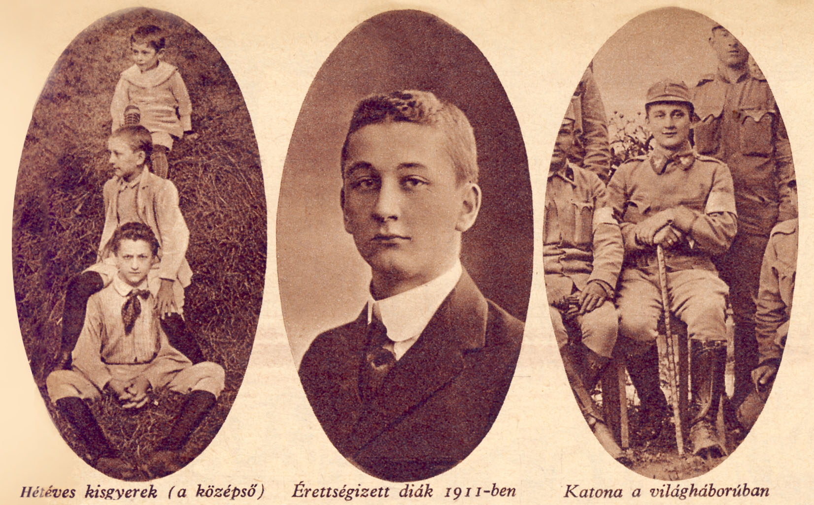 Szent-Györgyi Albert fényképei gyerek, ill. fiatal korából.